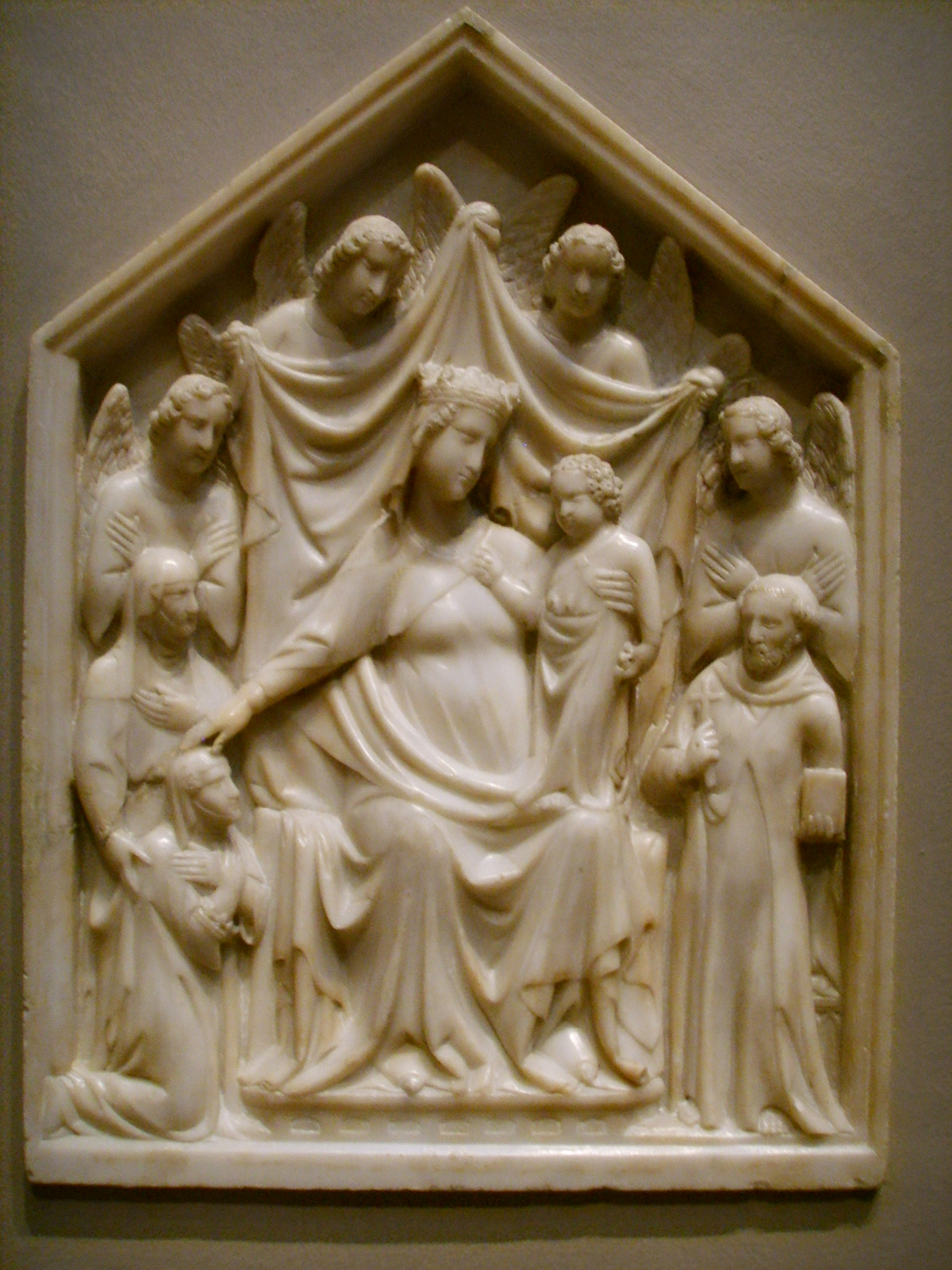 National gallery in washington d.c., tino di camaino, madonna con la regina sancia, santi e angeli, 1355 circa